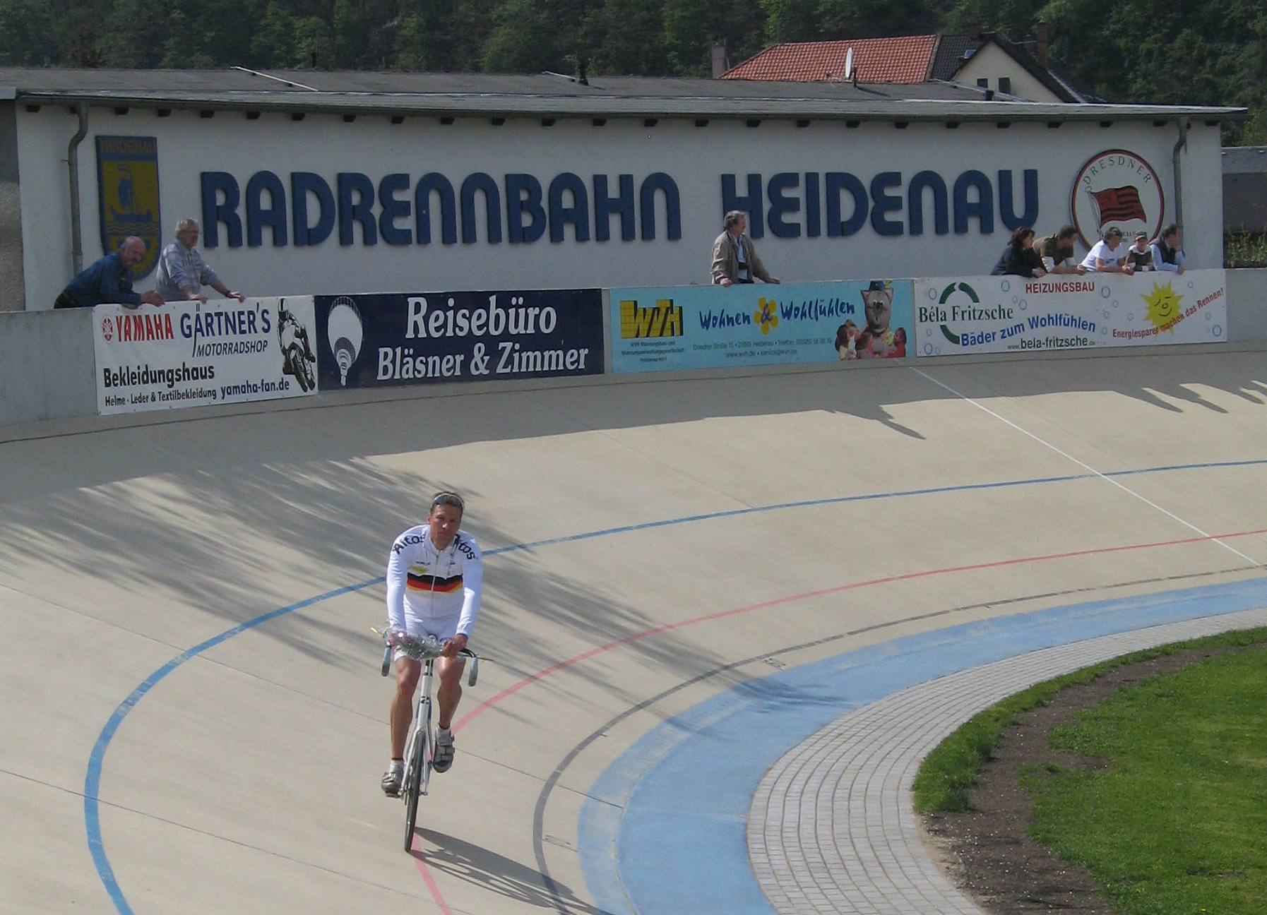 Jan Eric Schwarzer auf der Radrennbahn Heidenau